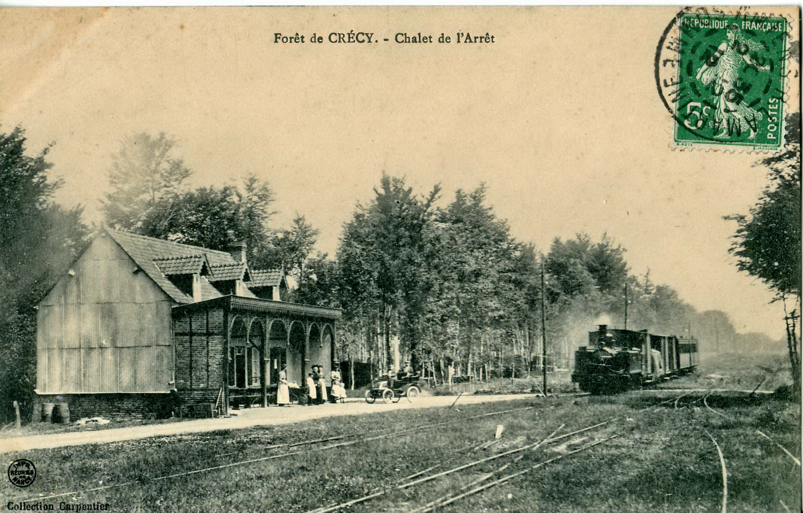 Carte postale ancienne éditée par CarpentierForêt de Crécy - Châlet de l'ArretIl s'agit de la Station Foret de Crécy de la ligne Abbeville - Dompierre des Chemins de fer départementaux de la Somme